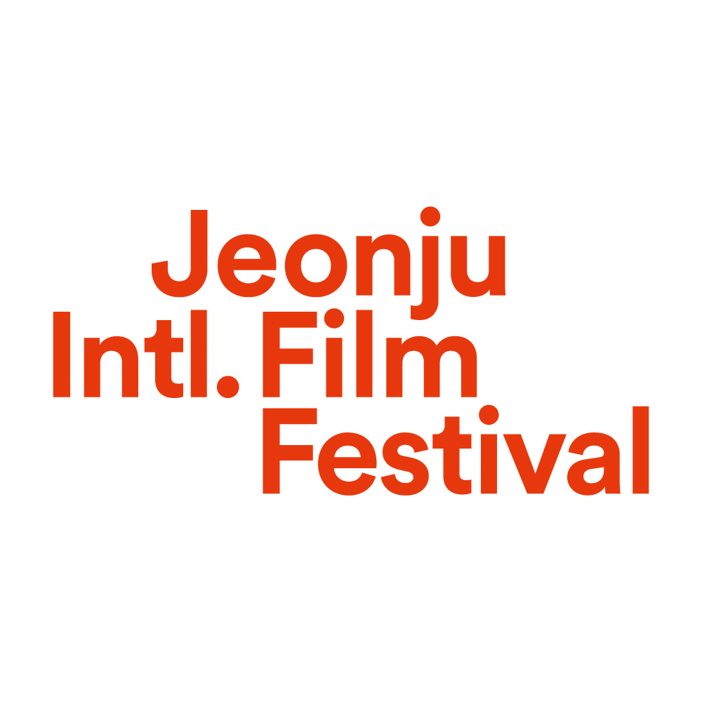 전주국제영화제 공식 로고